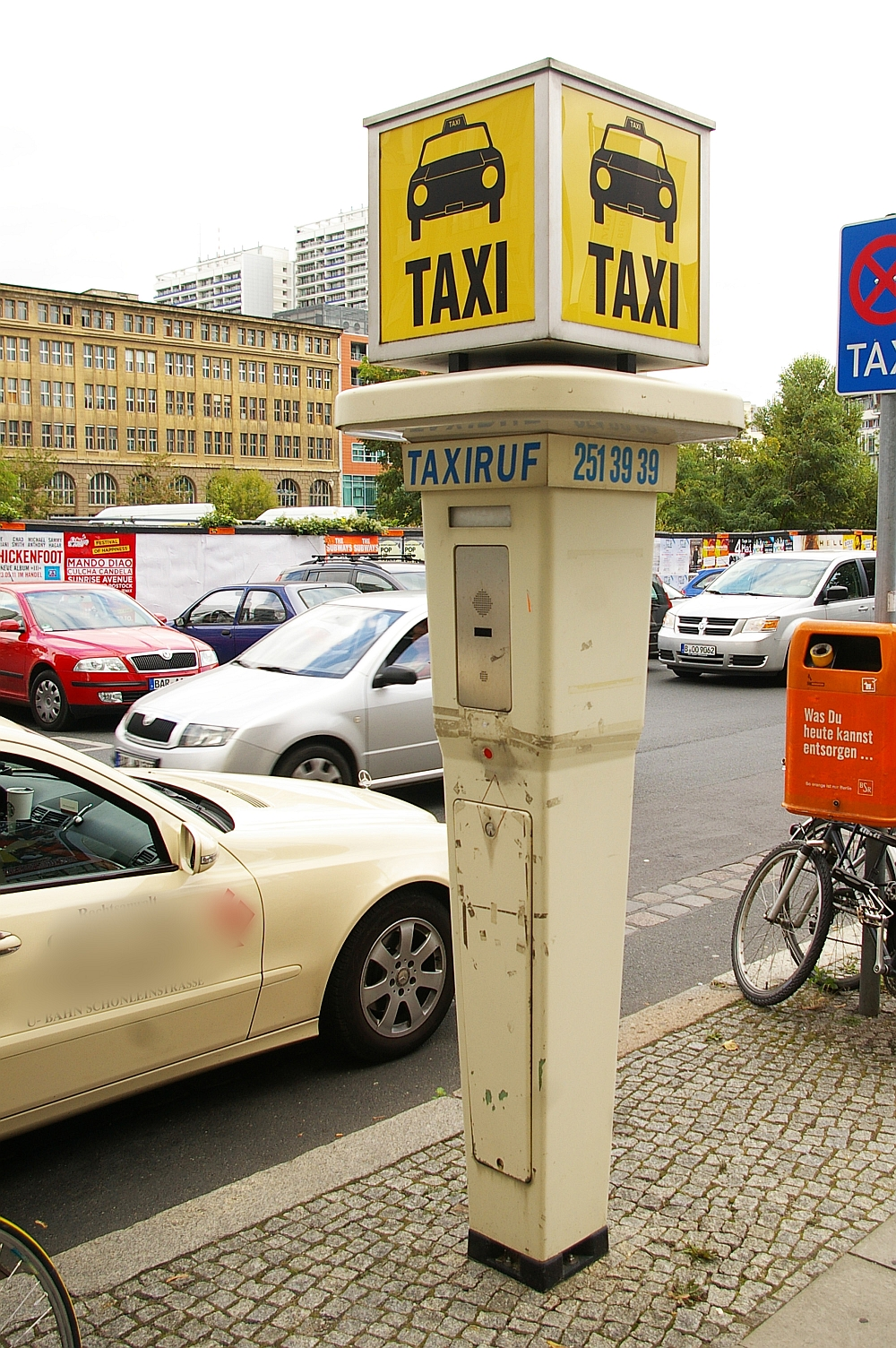 Taxirufsäule in Berlin 2011